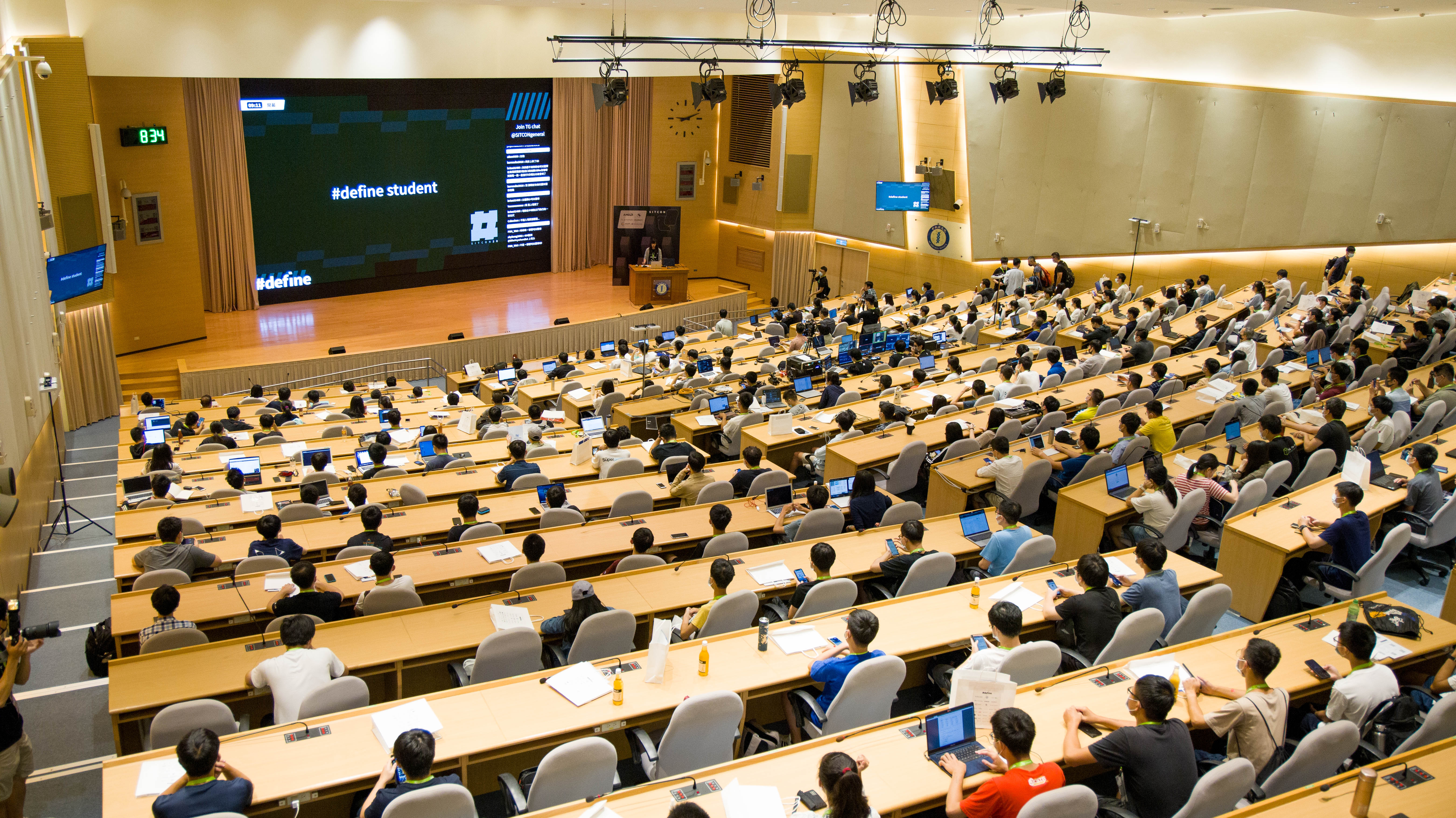 2020 年學生計算機年會，2020 年 8 月 8 日攝於中央研究院人文及社會科學館國際會議廳。原 Flickr 標題為《Zhennnnnn 5834》。